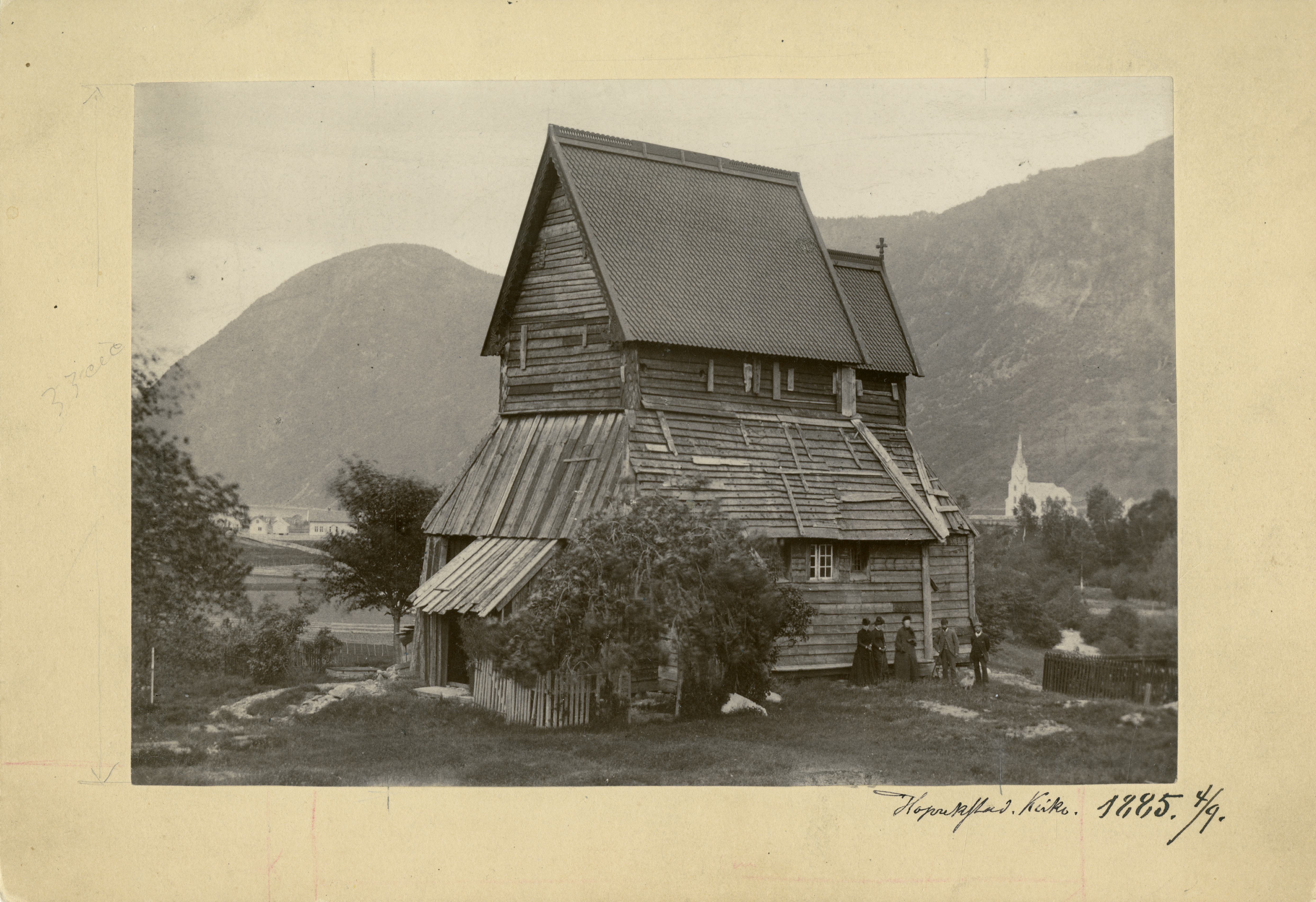 Hopperstad stavkirke i Vik, Sogn og Fjordane